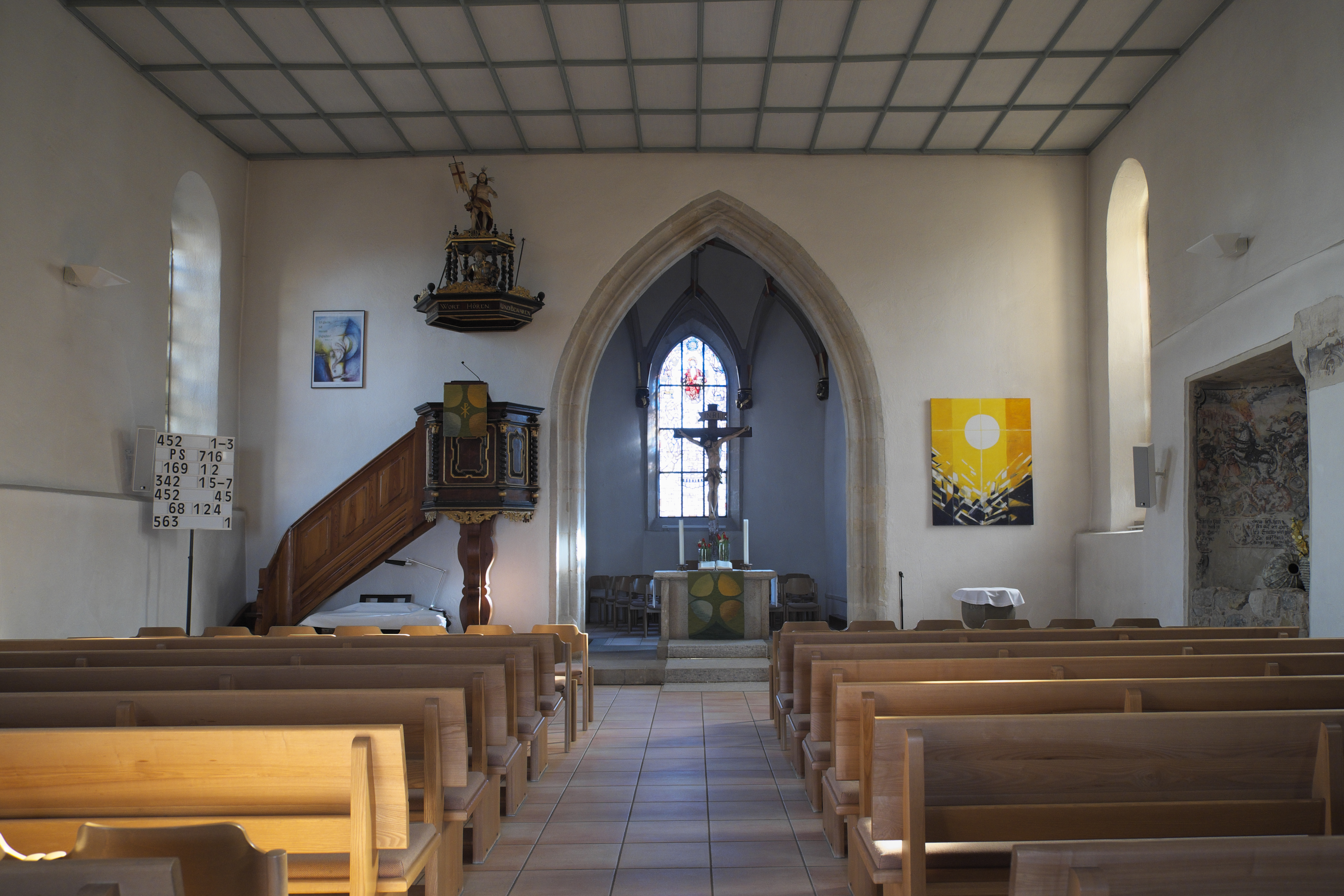 Stadtkirche in Rosenfeld im Zollernalbkreis (Baden-Württemberg/Deutschland), Innenraum